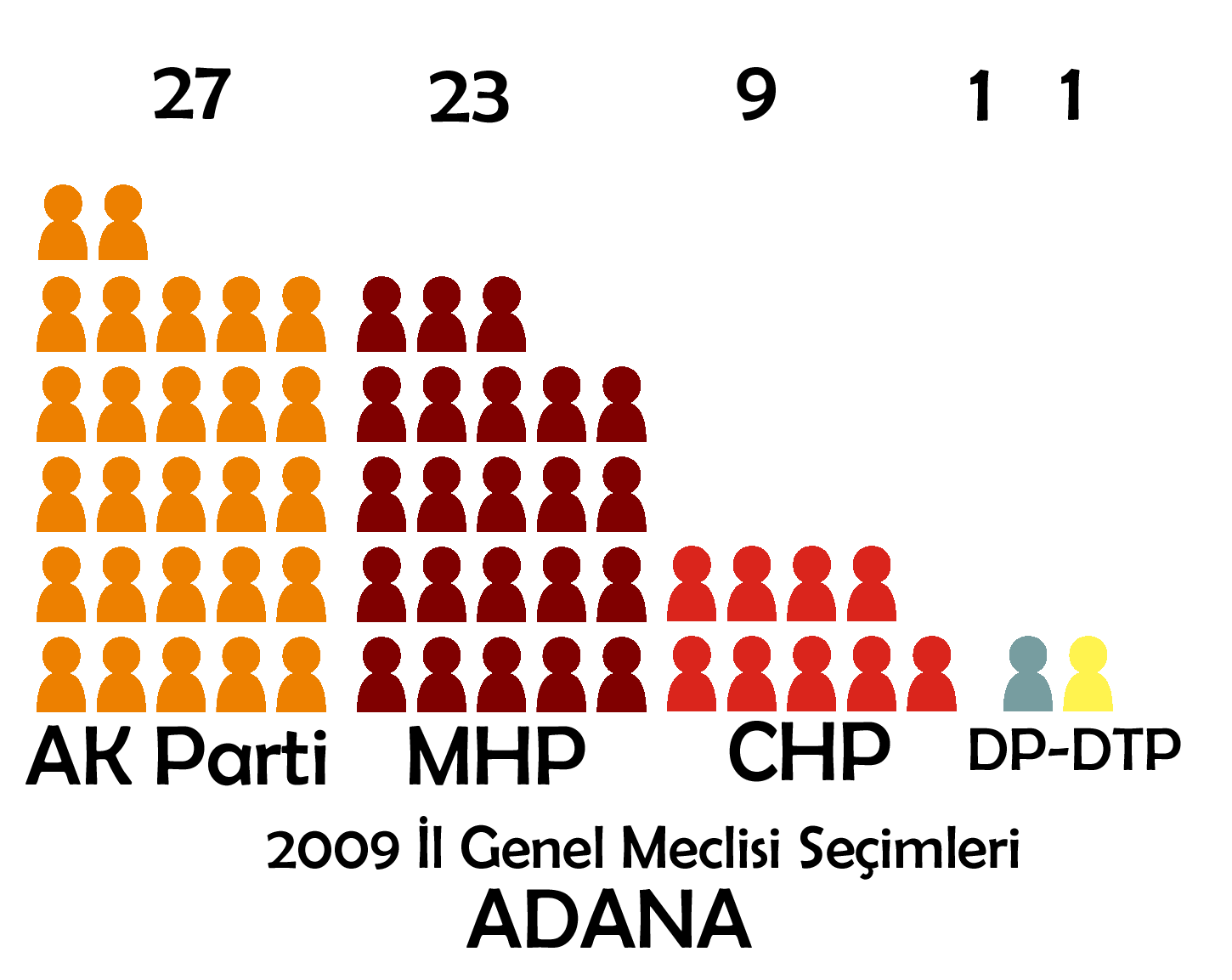 2009 Türkiye yerel seçimleri